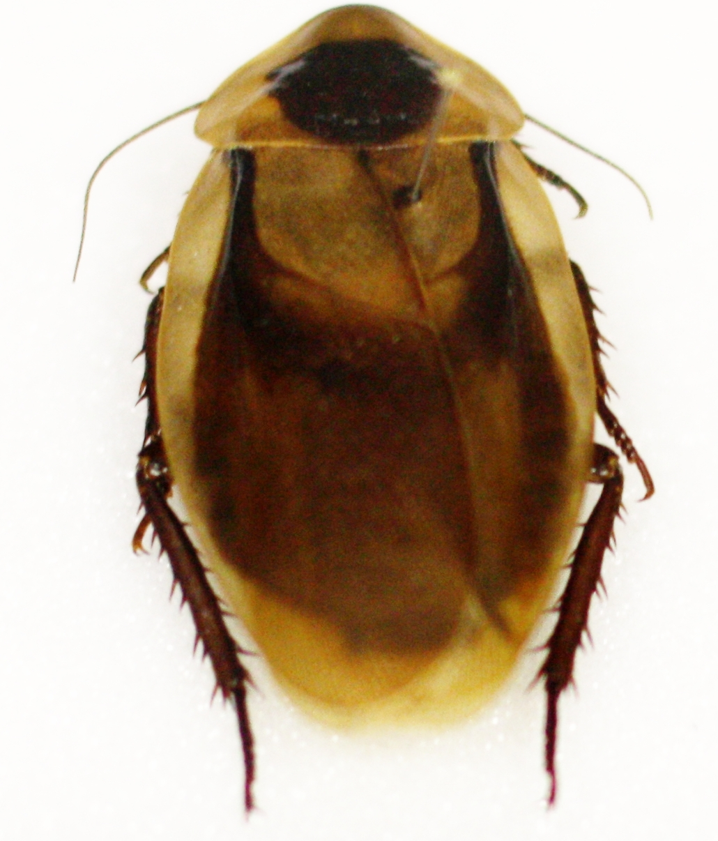 Naturkundliche Sammlung Übermaxx Überseenuseum Bremen; Schmetterlinge und andere Blaberus discoidalis Audinet-Serville, 1839